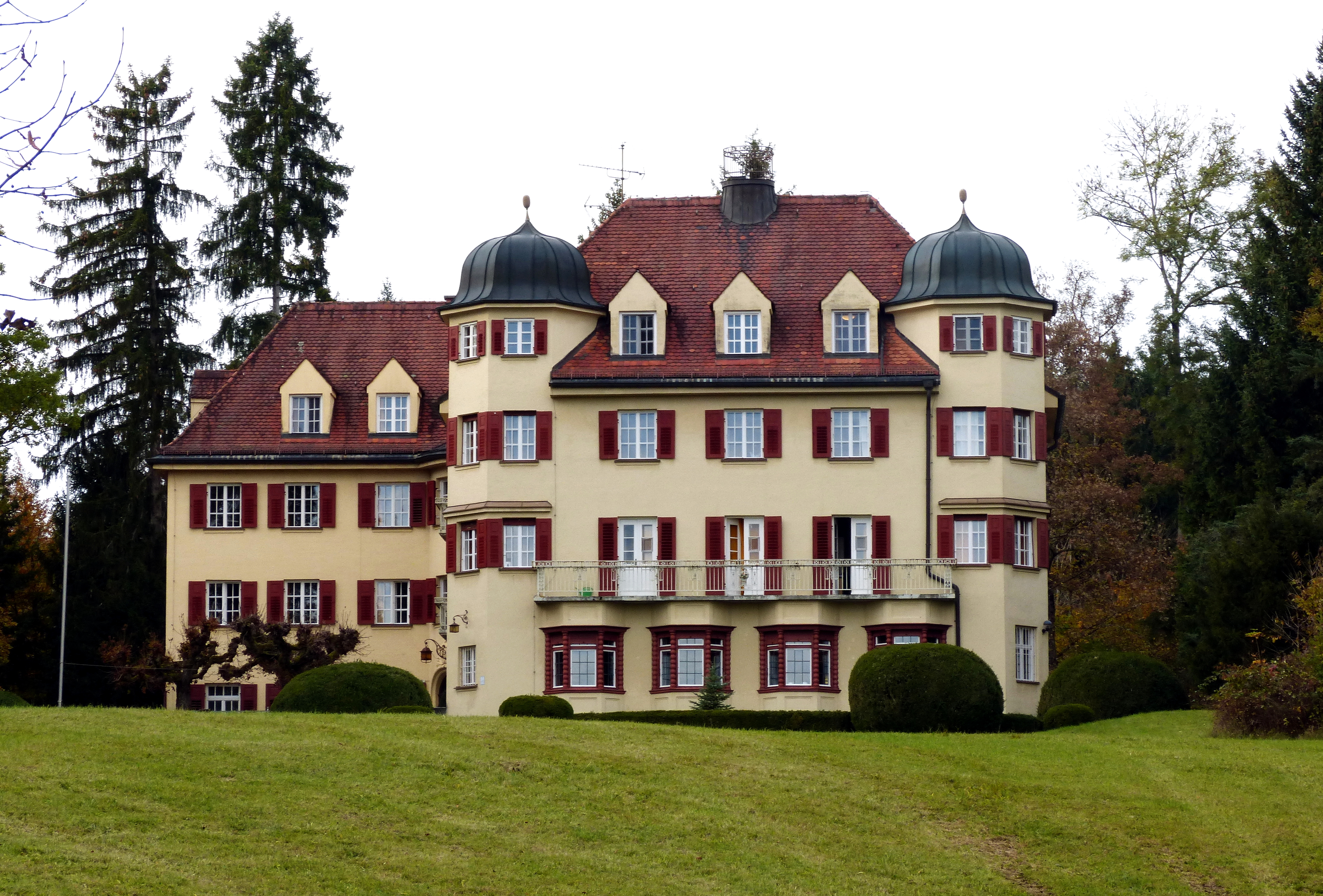 Tutzing, Beringerweg 24-28. Der dreigeschossige Zweiflügelbau mit Walmdächern, Erkertürmen und Stehgauben entstand 1912 auf dem ehemaligen Grund des Ingenieurs und Erfinders Johann Georg Beringer, der diesen dem Bayerischen Verkehrsbeamtenverein mit der Auflage vermacht hatte, dort ein Erholungsheim für Vereinsmitglieder zu erbauen.